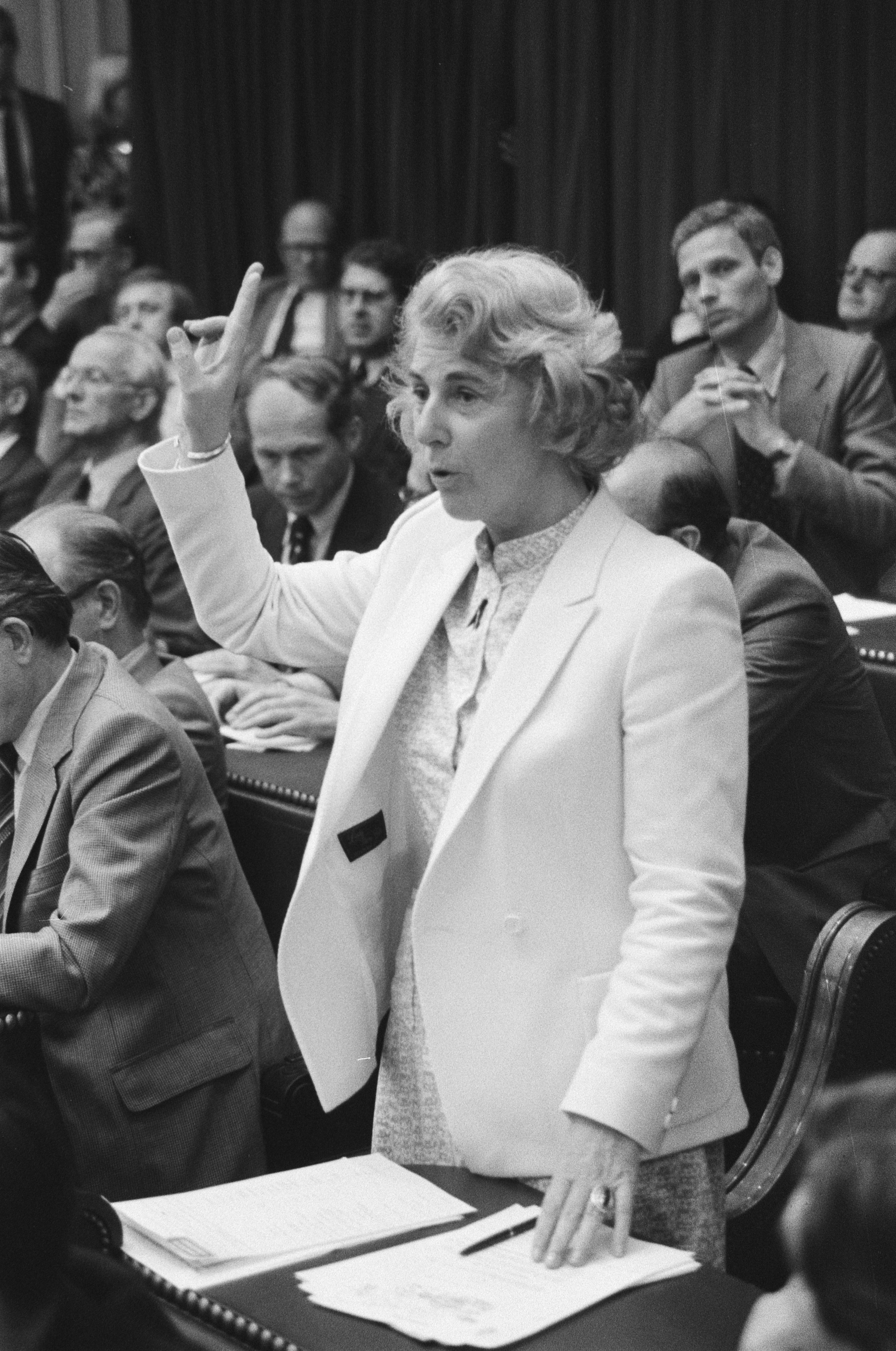 Collectie / Archief : Fotocollectie Anefo Reportage / Serie : Tweede Kamer voor het eerst in nieuwe samenstelling bijeen, nieuwe leden werden beëdigd Beschrijving : Minister Gardeniers tijdens haar beediging Datum : 10 juni 1981 Locatie : Den Haag, Zuid-Holland Trefwoorden : ambtsaanvaardingen, ministers, politiek Persoonsnaam : Gardeniers-Berendsen, Til Fotograaf : Antonisse, Marcel / Anefo Auteursrechthebbende : Nationaal Archief Materiaalsoort : Negatief (zwart/wit) Nummer archiefinventaris : bekijk toegang 2.24.01.05 Bestanddeelnummer : 931-5353